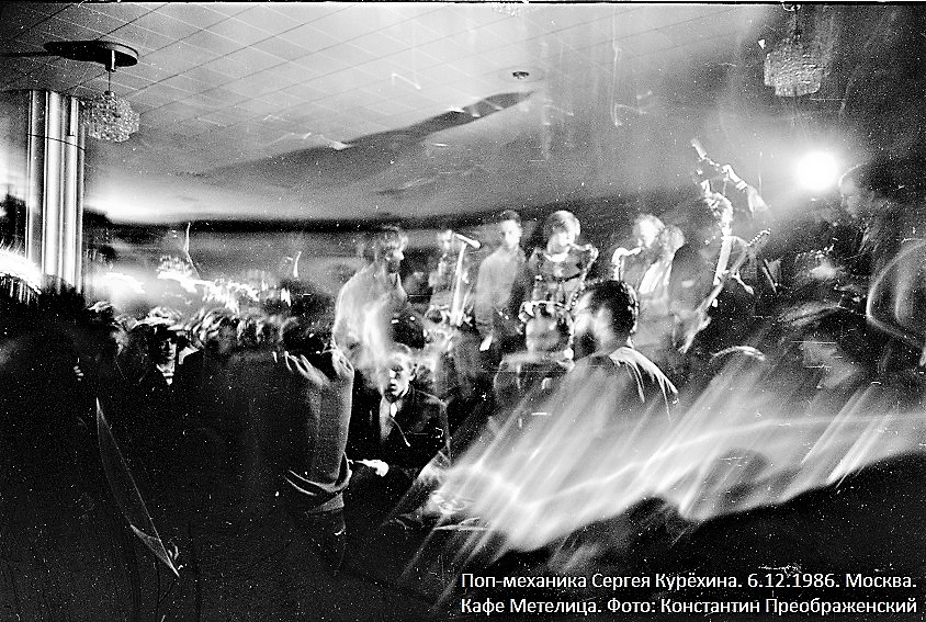 Рок-форум. 6 Декабря 1986, Москва, кафе Метелица. Волшебное фото с концерта Поп-механики Сергея Курехина. На переднем плане Олег Гаркуша и фотограф Сергей Борисов.